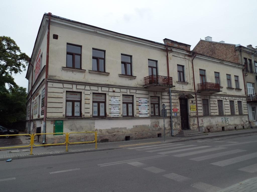 Пам’яткою часів терору в Холмі є будівля по вул. Реформацькій, 27. Тут розміщувалася Холмська безпека (УБ) - місце куди привозили катувати та допитувати як польських, так і українських патріотів.